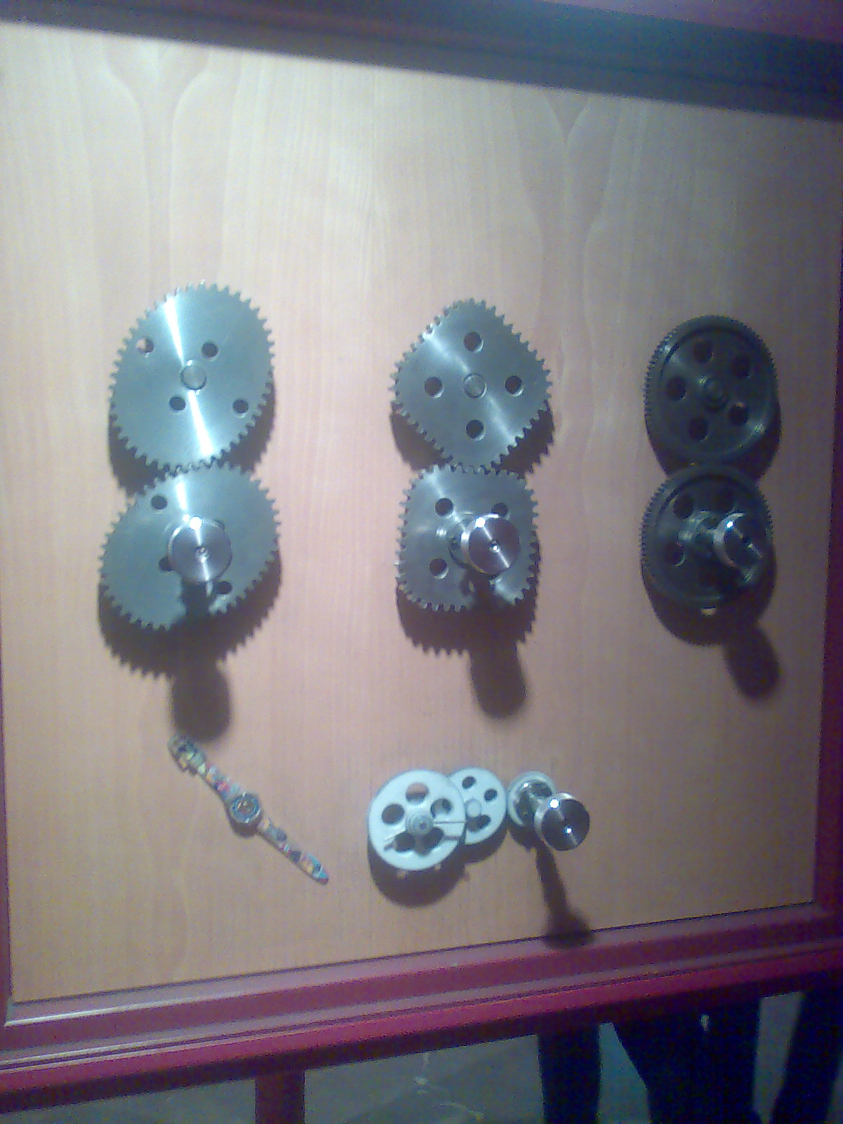 Engranajes de museo ubicados en el Museo de las Ciencias de Granada